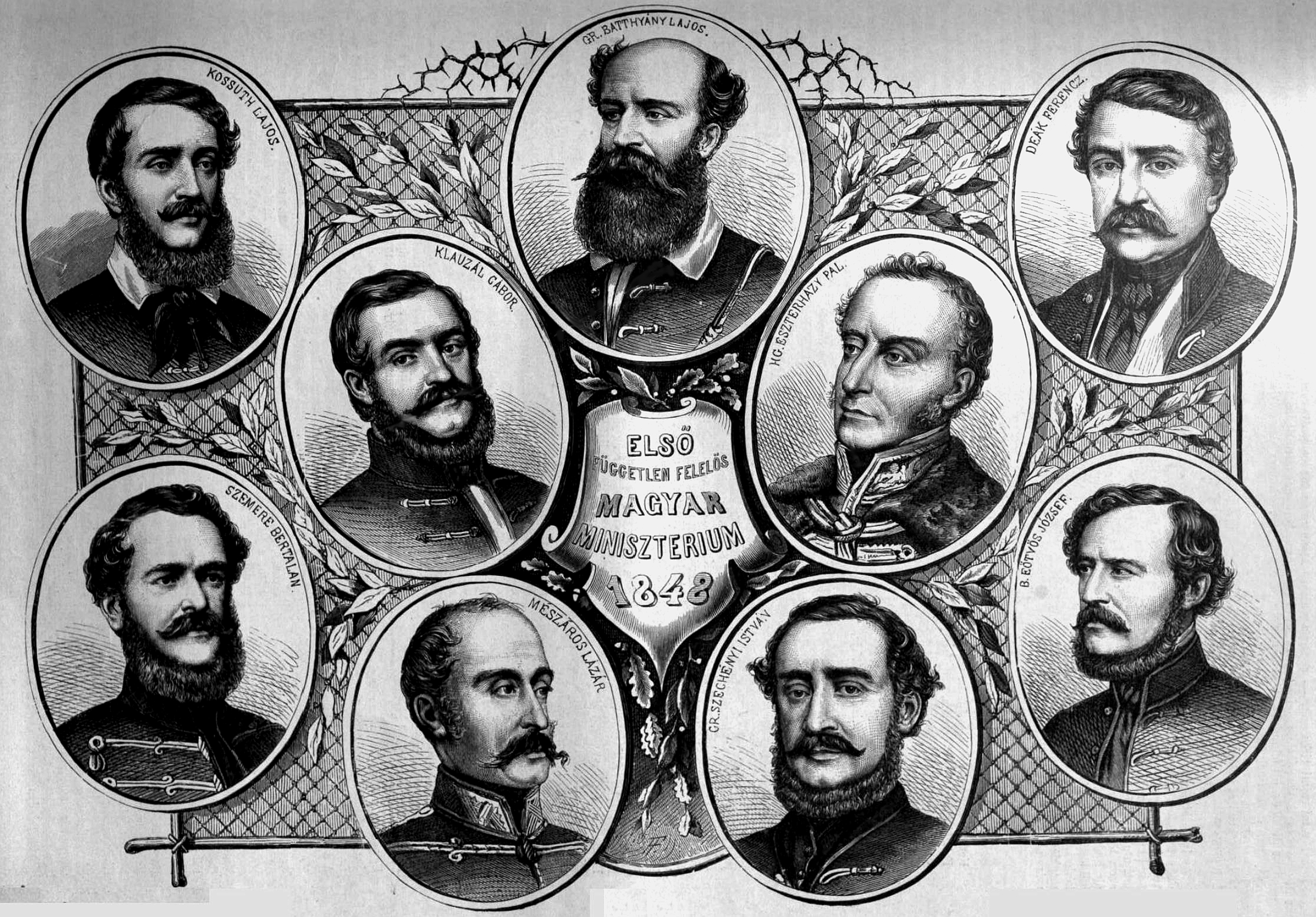 A Batthyány-kormány. (Vasárnapi Ujság, 1867. június 2.)